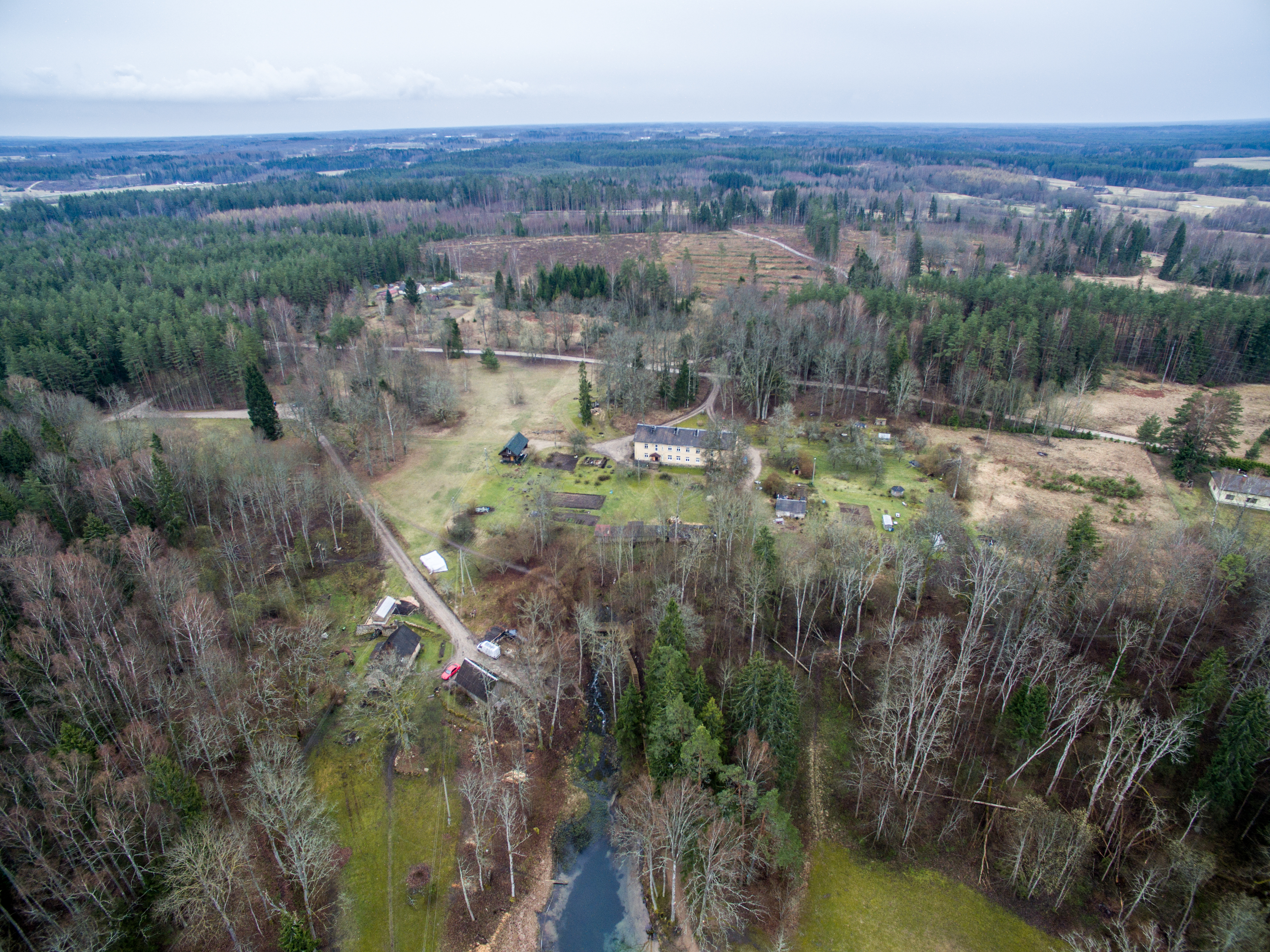 Allaži Parish, LV-2154, Latvia